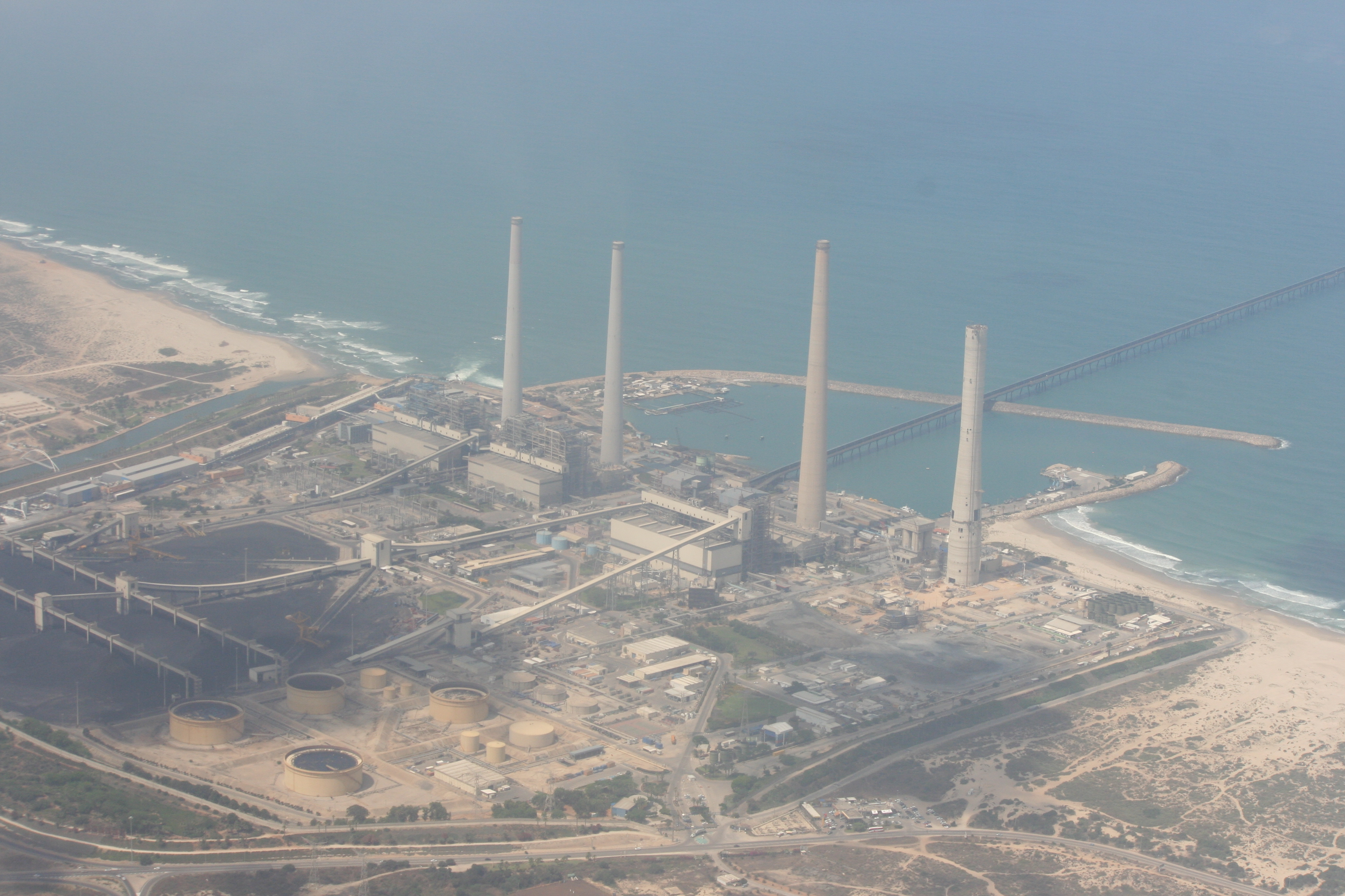 תחנת הכוח אורות רבין בחדרה, ארובה רביעית בשלבי בנייה מתקדמים